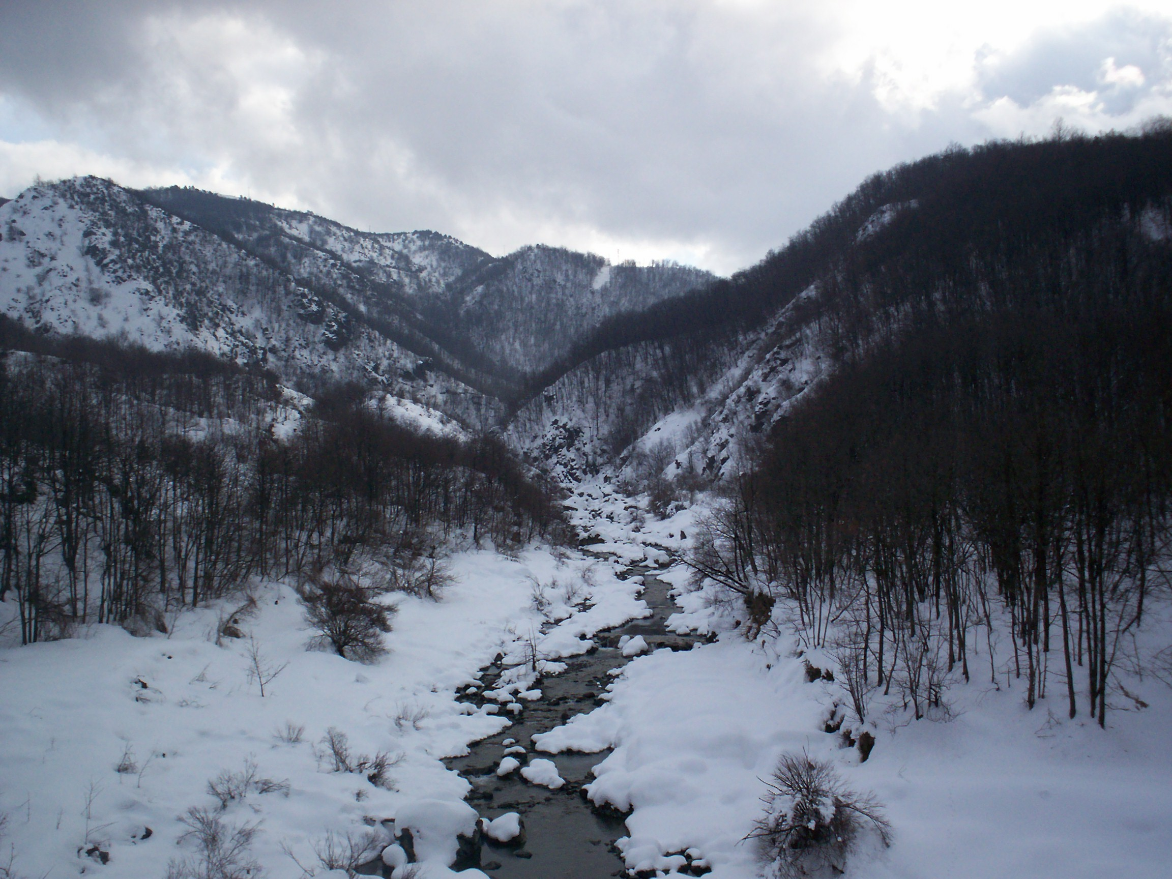 immagine invernale dell'alto corso del torrente piota